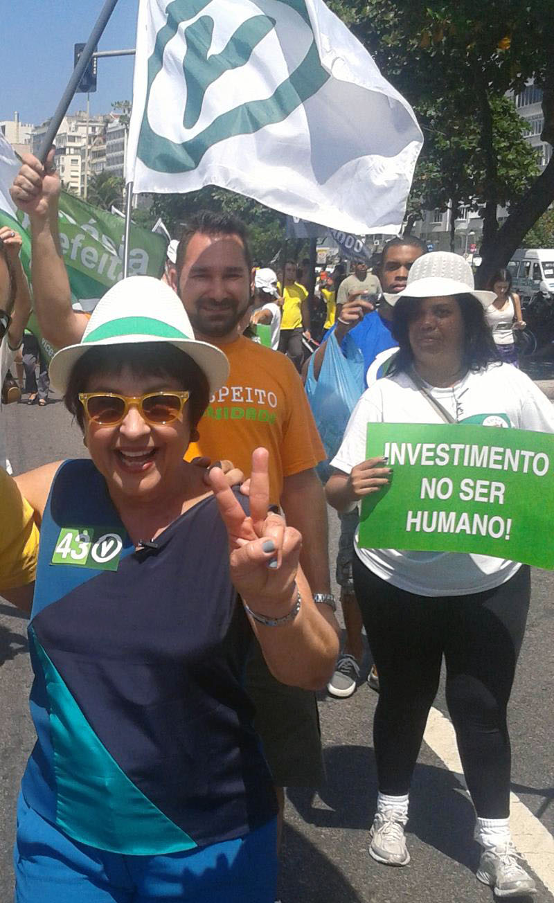 Aspásia Camargo na orla de Copacabana durante campanha para prefeita do Rio em 2012